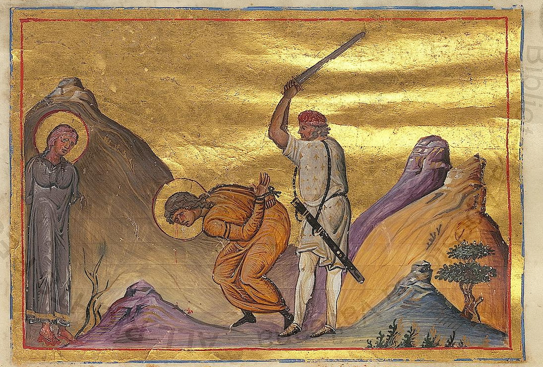 Мцц. Рипсимия, Гаиания. Константинополь. 985 г. Миниатюра Минология Василия II. Ватиканская библиотека. Рим.